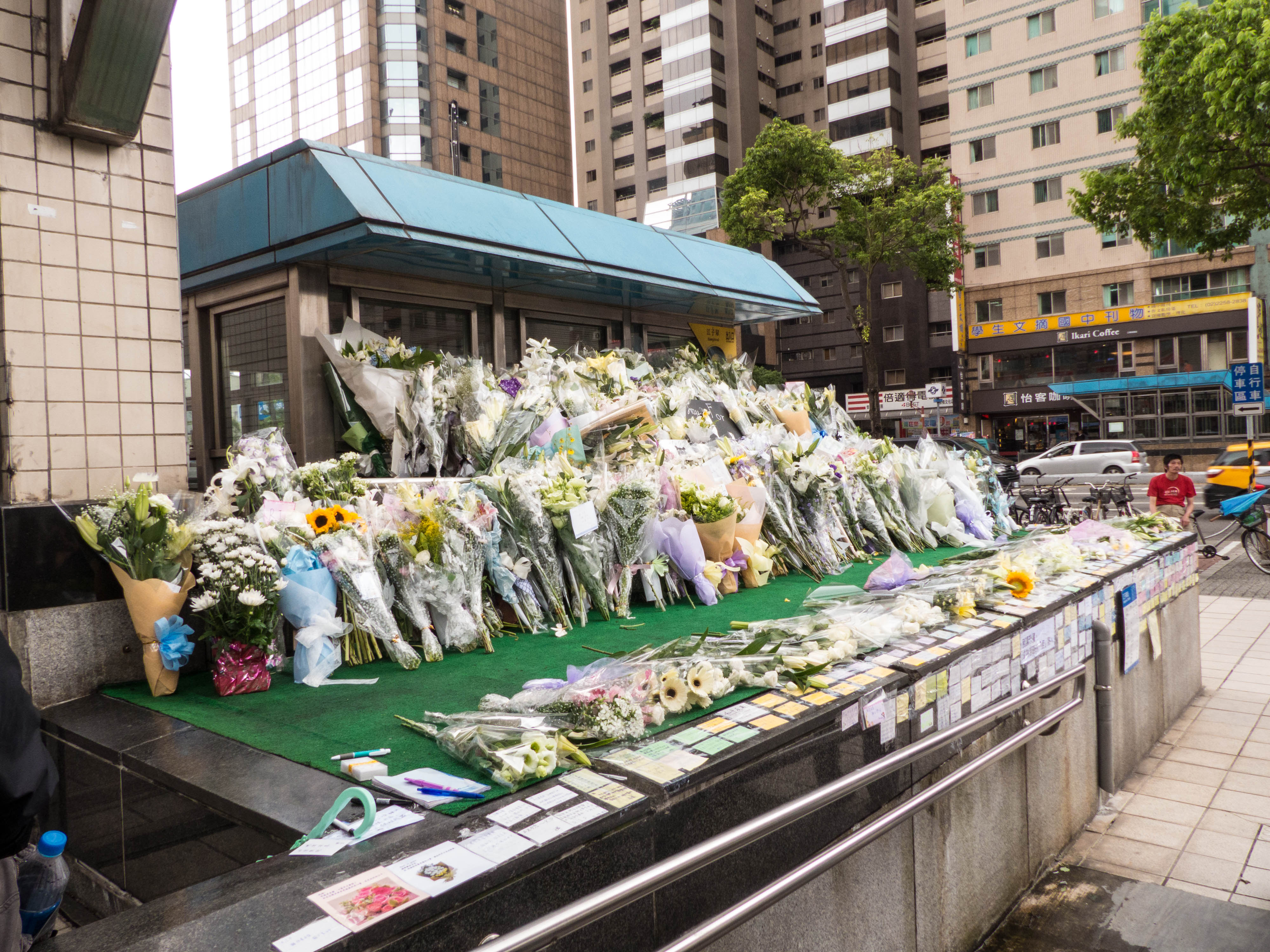 臺北捷運江子翠站三號出口後方的獻花臺與祈福卡。